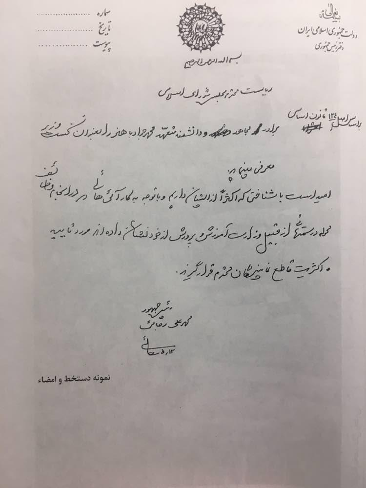 حکم رئیس جمهور وقت ایران (محمدعلی رجایی) که در سربرگی رسمی منقش به نخستین نشان جمهوری اسلامی ایران نوشته شده است. بر روی این نشان خط‌خوردگی دیده می‌شود. تاریخ این سند ۱۲ امرداد ۱۳۶۰ است و بیش از یک سال از تاریخ رسمیت نشان کنونی جمهوری اسلامی ایران (مصوب ۱۹ اردیبهشت ۱۳۵۹) گذشته است.